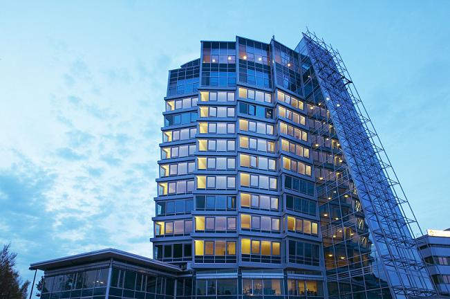 Anbau am Klinikum Chemnitz in der Dämmerung (Foto gemacht von Uwe Kreißig)